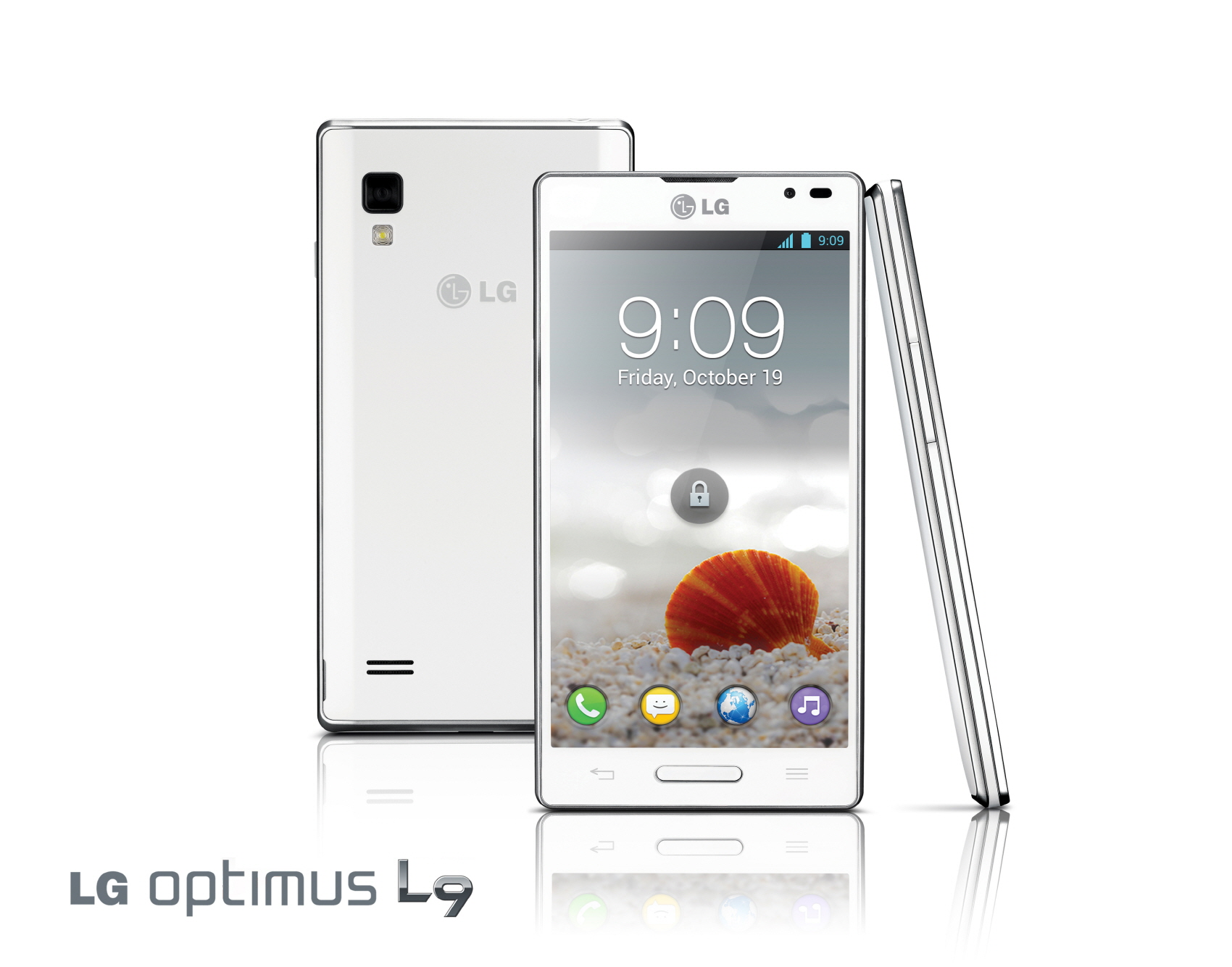 LG전자가 독창적인 디자인을 적용한 ‘L-시리즈’의 최신작, ‘옵티머스 L9’을 9월부터 유럽, 북미, 아시아, 중남미 등 글로벌 시장에 순차 출시한다.